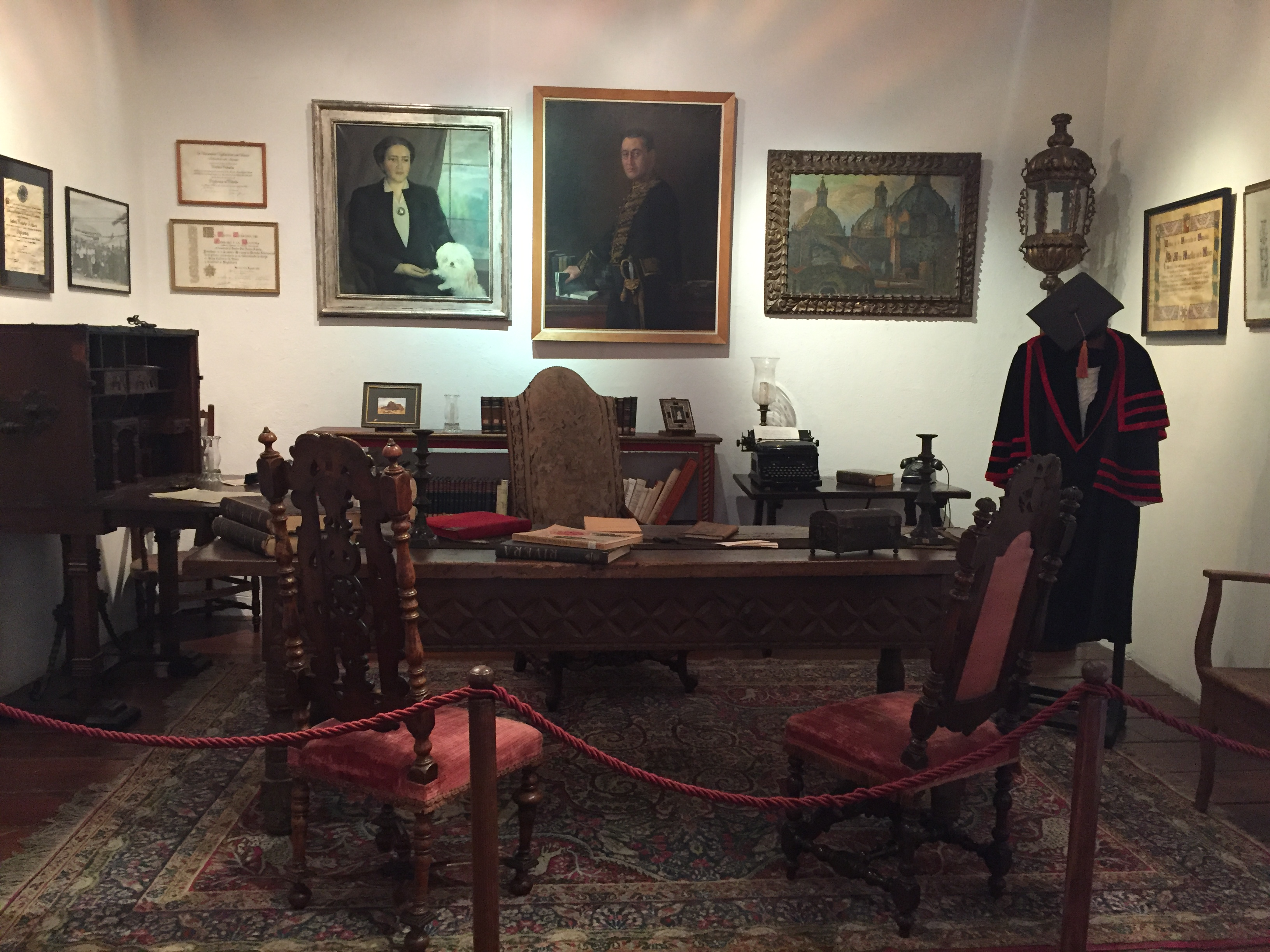 Fotografía del estudio del periodista, escritor, diplomático y académico Isidro Fabela dentro del Museo Casa del Risco en San Ángel, México. Dentro del estudio se exhiben pinturas de retratos, reconocimientos, libros, y objetos personales como su toga y birrete.